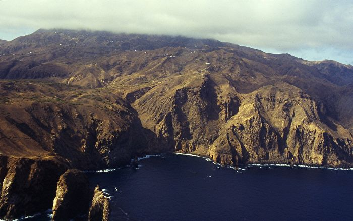 Steilküste im Norden der Insel Brava, wie oft mit "Wolkenhut". Blick aus dem Hubschrauber.